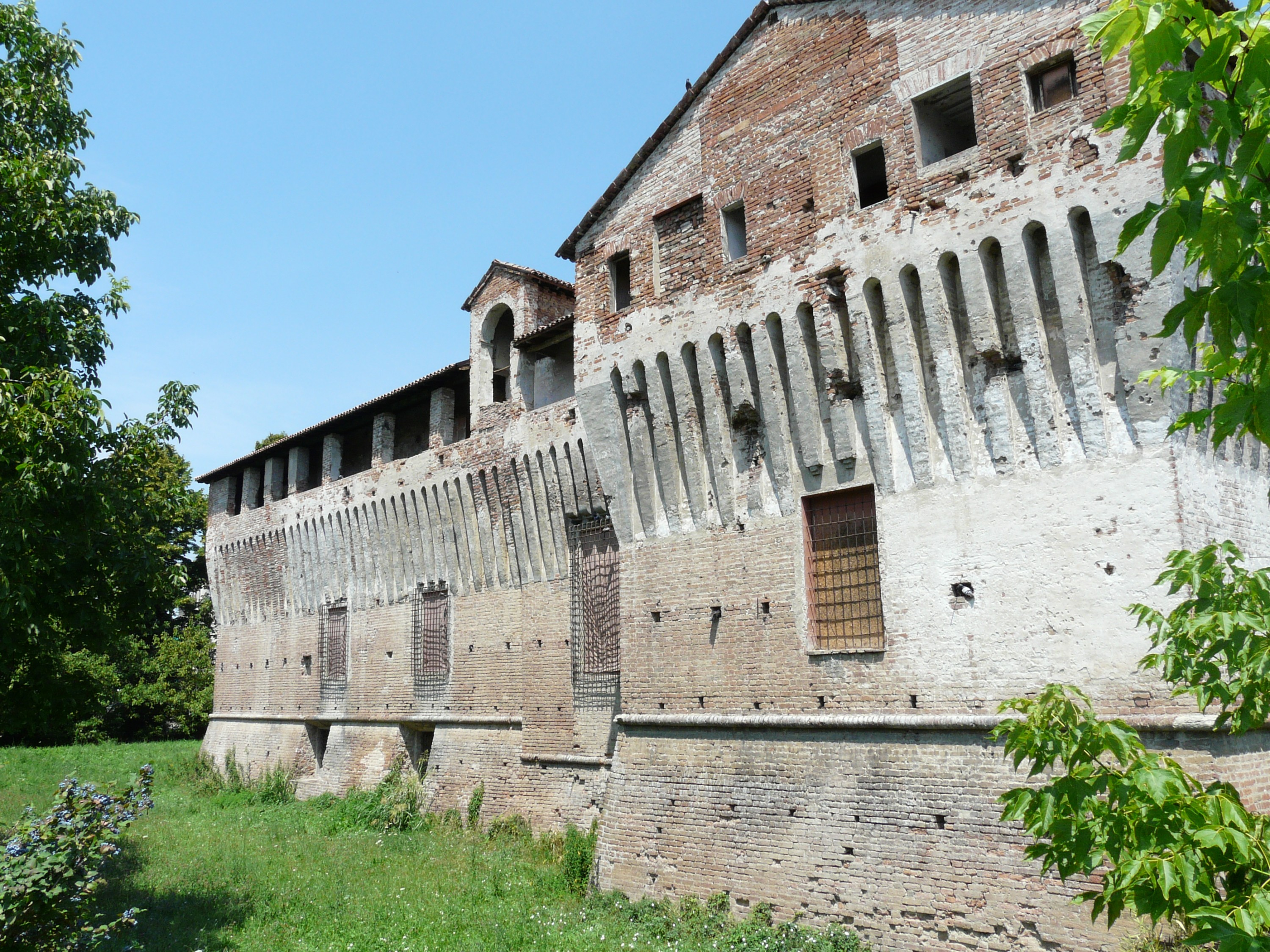 Castello di Roccabianca, Emilia-Romagna, Italia